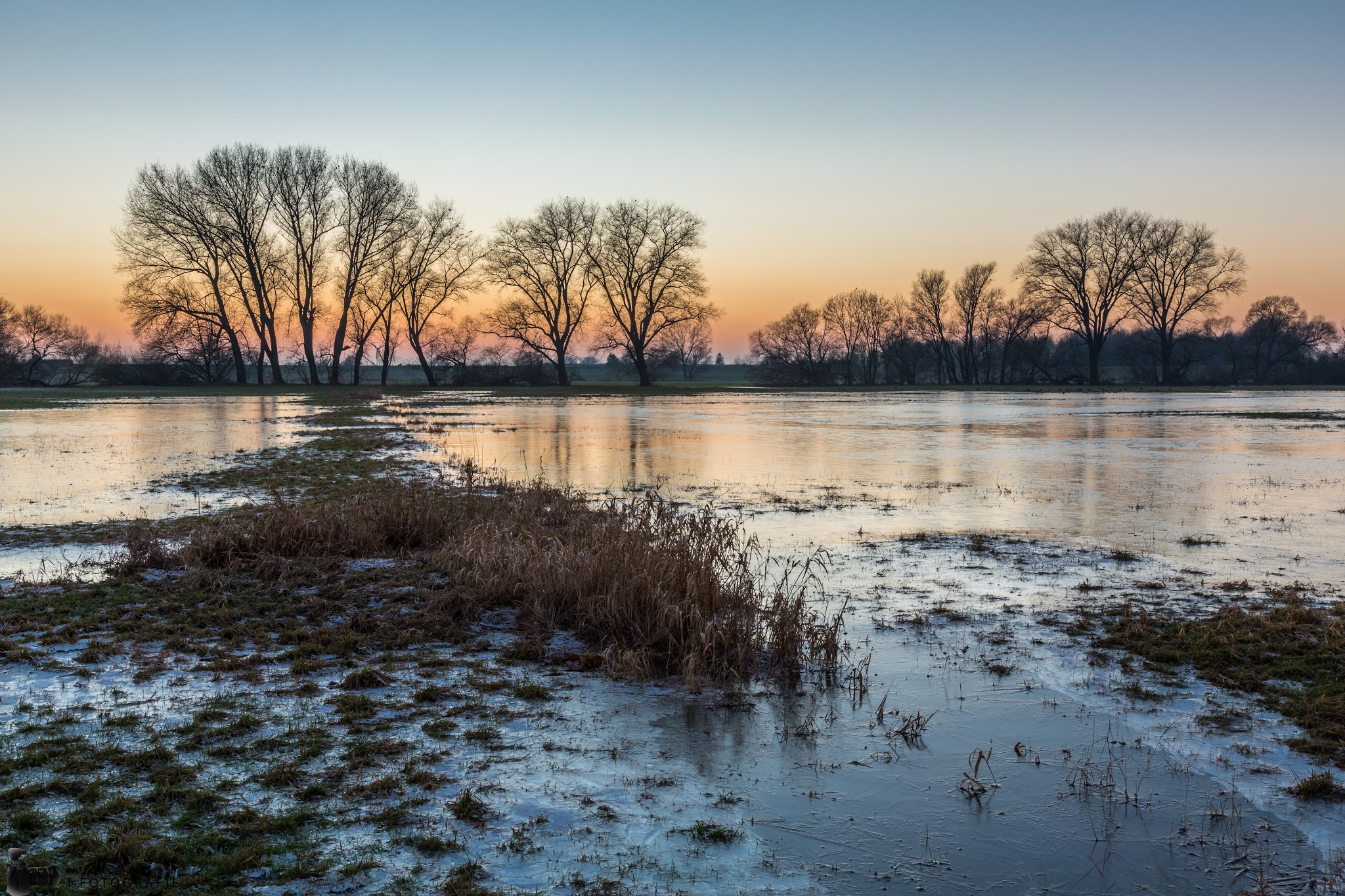 Überflutete und zugefrorene Wiesen auf der Julius Plate